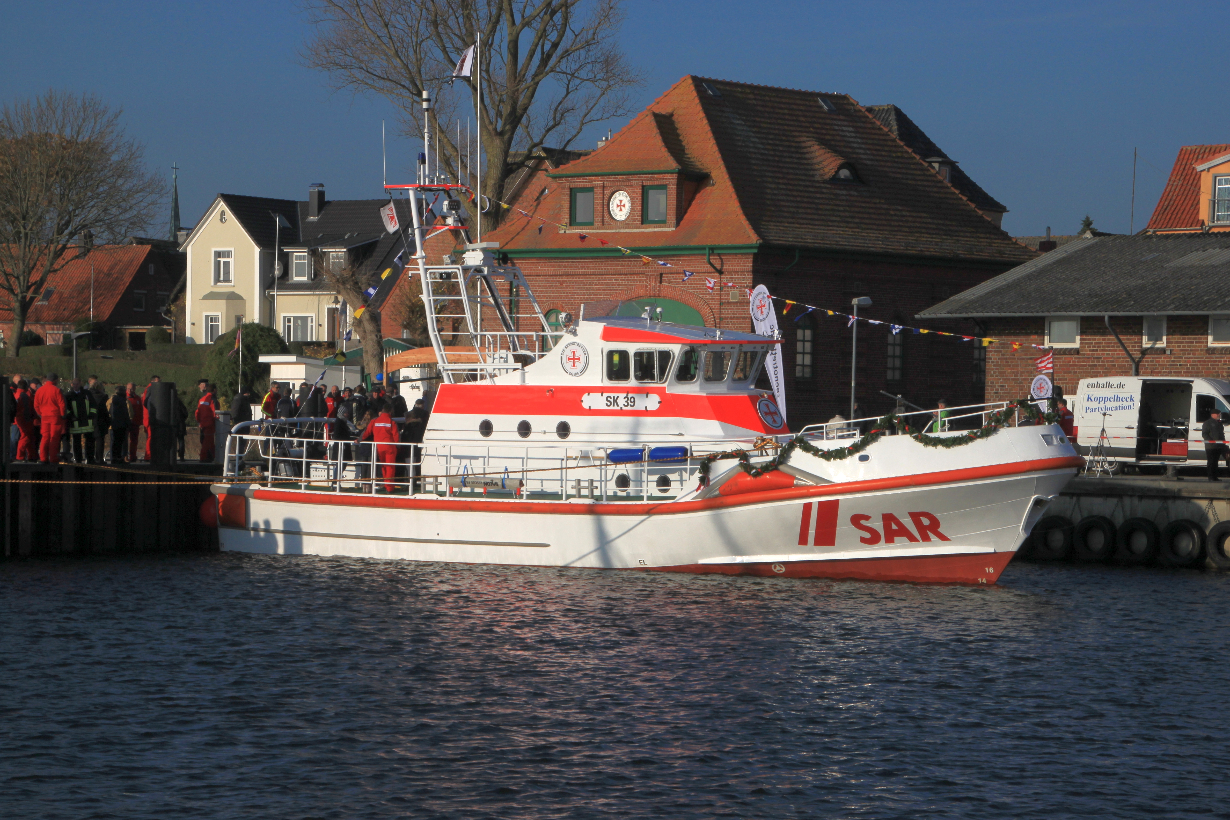 Seenotrettungskreuzer FRITZ KNACK der DGzRS, Taufe am 17.11.2018 in Maasholm